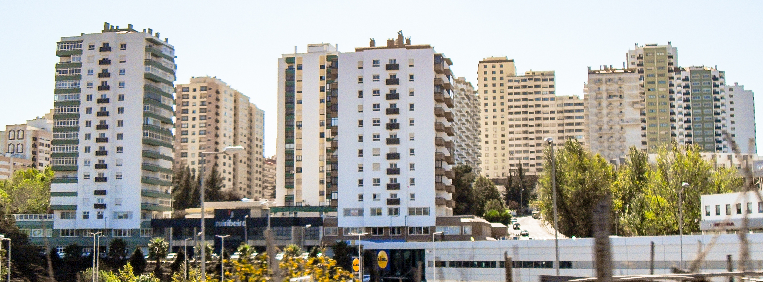 Horizonte de Alfragide em outubro de 2017